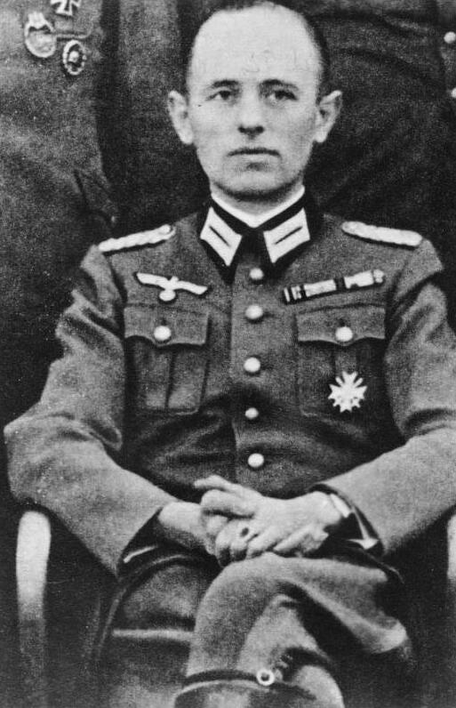 Reinhard Gehlen, Leiter der von den Amerikanern in Westdeutschland aufgezogenen Spionageorganisation. Unser Bild zeigt Gehlen in der Uniform der Naziwehrmacht (Zeitungsrepro vom 25. August 1954)